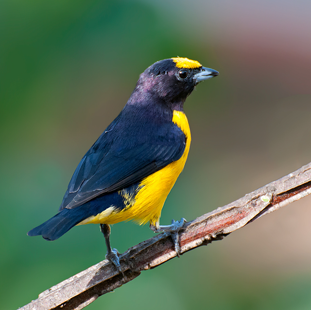 Euphonia chloroticaPiraju-SP - Brasil